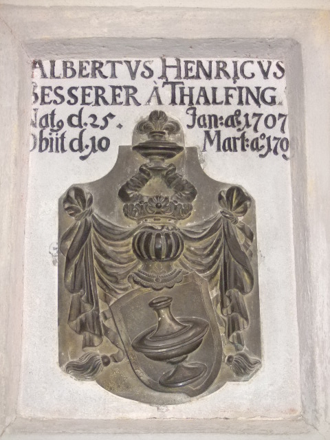 Evangelische St.-Lambertus-Kirche, Bernstadt (Alb), Alb-Donau-Kreis, Baden-Württemberg Grabmal eines Mitglieds des Ulmer Patriziergeschlechts Besserer von Thalfingen